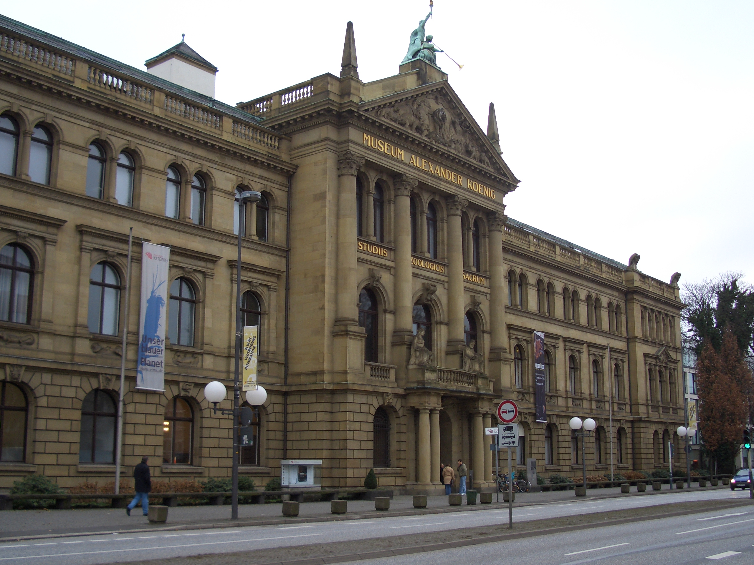 Außenfassade des Museums Koenig in Bonn.